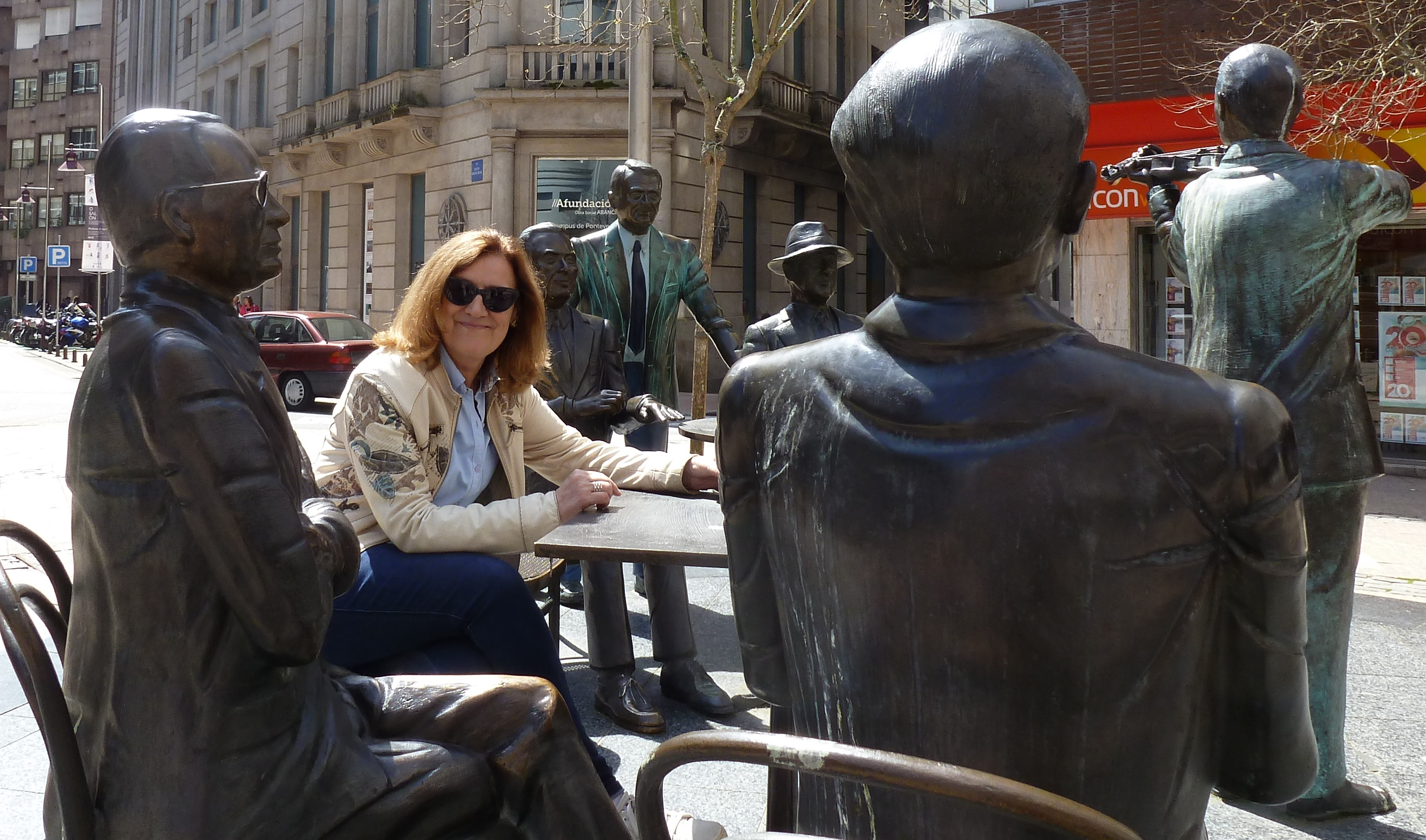 Ramona Jiráldez en Pontevedra, 19/04/2018